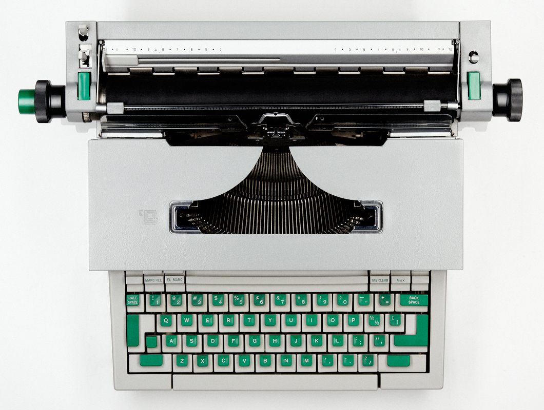 Olivetti Praxis 48 Typewriter Ettorre Sottsass